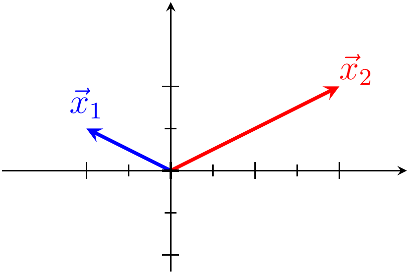 Dva označené vektory v rovině s vyznačeným působištěm, usazené v souřadné soustavě.